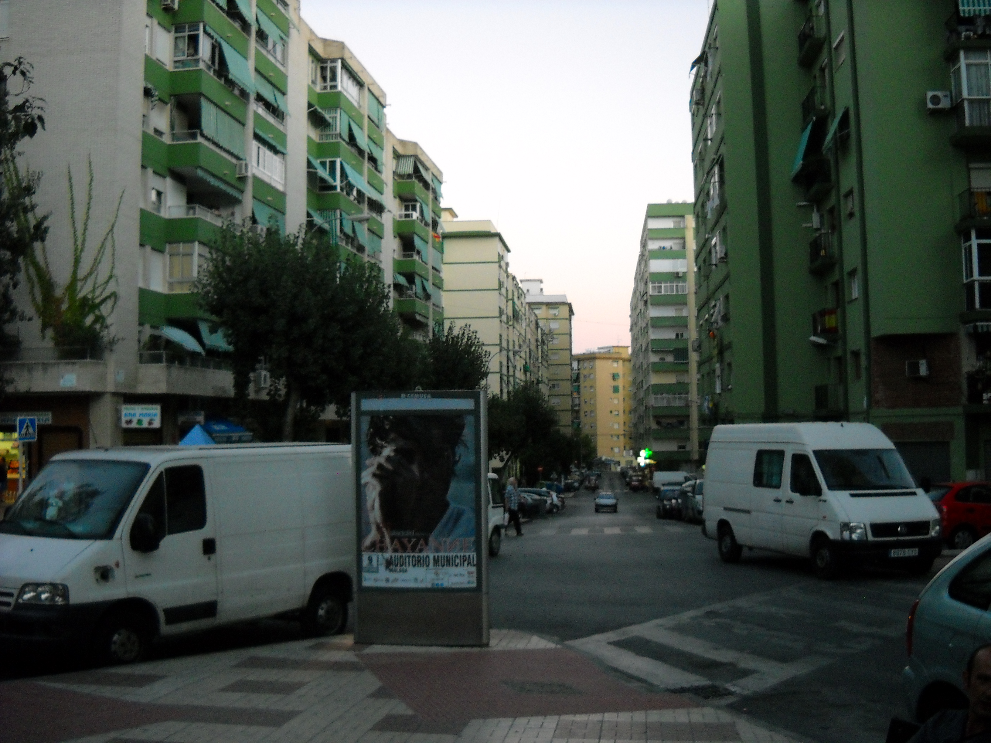 Calle Magistrado Salvador Barberá, Málaga, Andalucía, España.